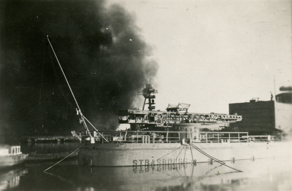 Vue du sabordement de la Flotte à Toulon le 28 novembre 1942. Il s'agit du Strasbourg.